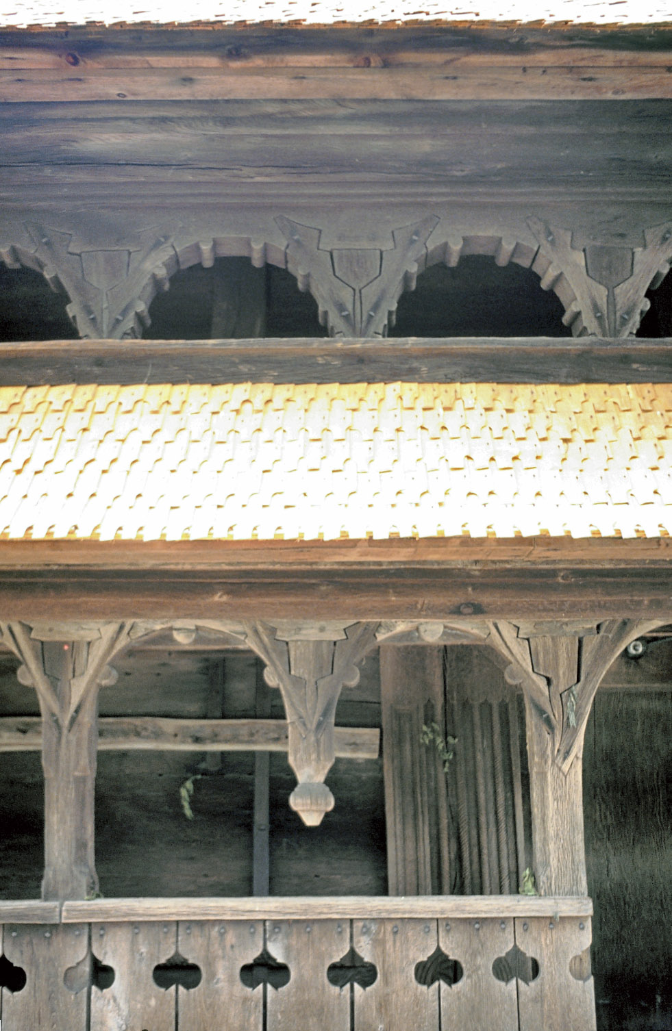 Şurdeşti, Maramureş: biserica de lemn din partea de jos a satului care este şi biserică parohială, datată 1766. Pridvorul vestic, fragment.